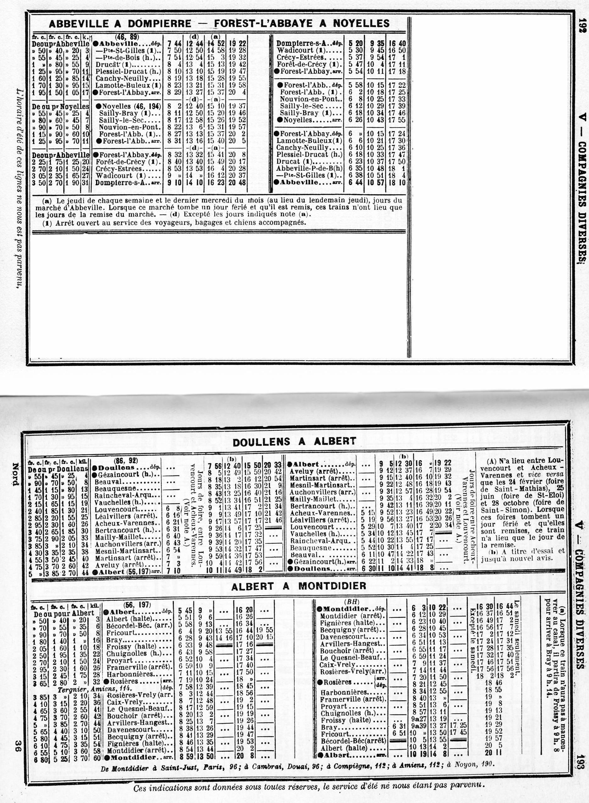 Tableaux horaires des lignes Abbeville - Dompierre, Noyelles - Forest-l'Abbaye, Ercheu - Offoy, Doullens - Albert, Albert - Montdidier du réseau départemental de la Somme exploité par la société des Chemins de fer économiques, ainsi que de la ligne Herzelle - St-Momelin.